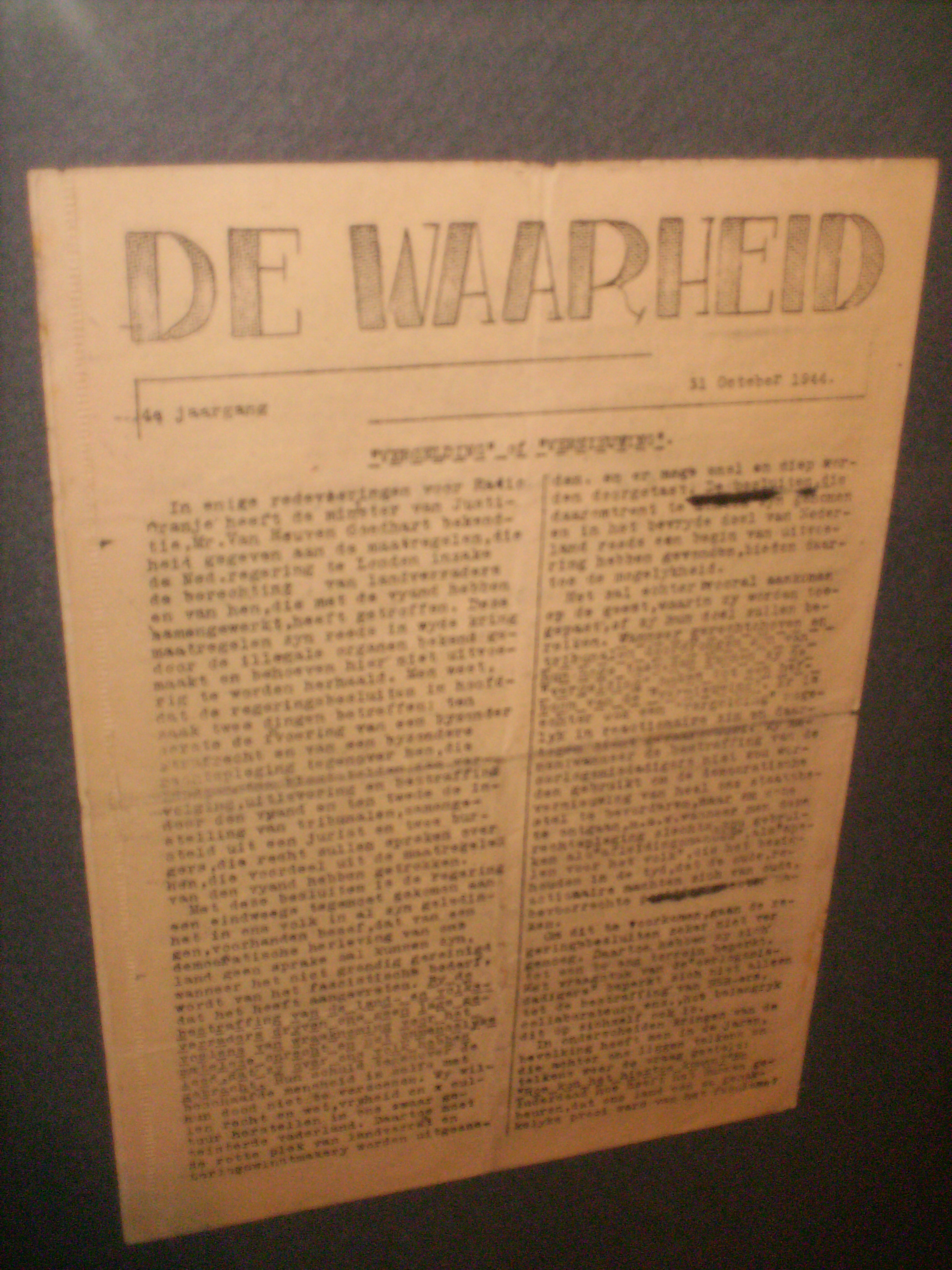 Illegale communistische krant De Waarheid van 31 oktober 1944 tentoongesteld in de expositie 'Drukken in Oorlogstijd' in het Grafisch Museum te Groningen